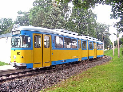 Thueringerwaldbahn Triebwagen 592